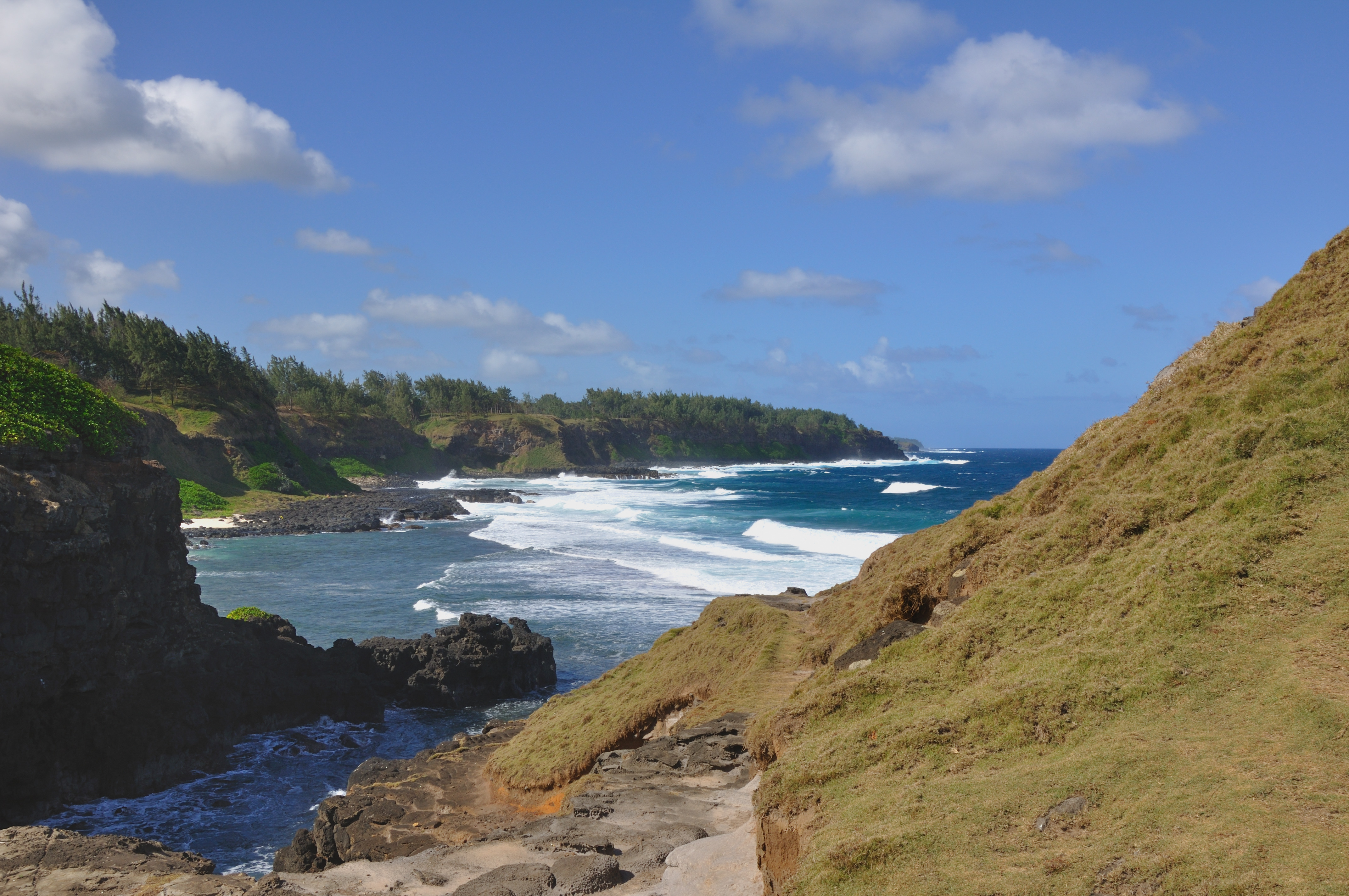 Mauritius, La roche qui pleure, Souillac